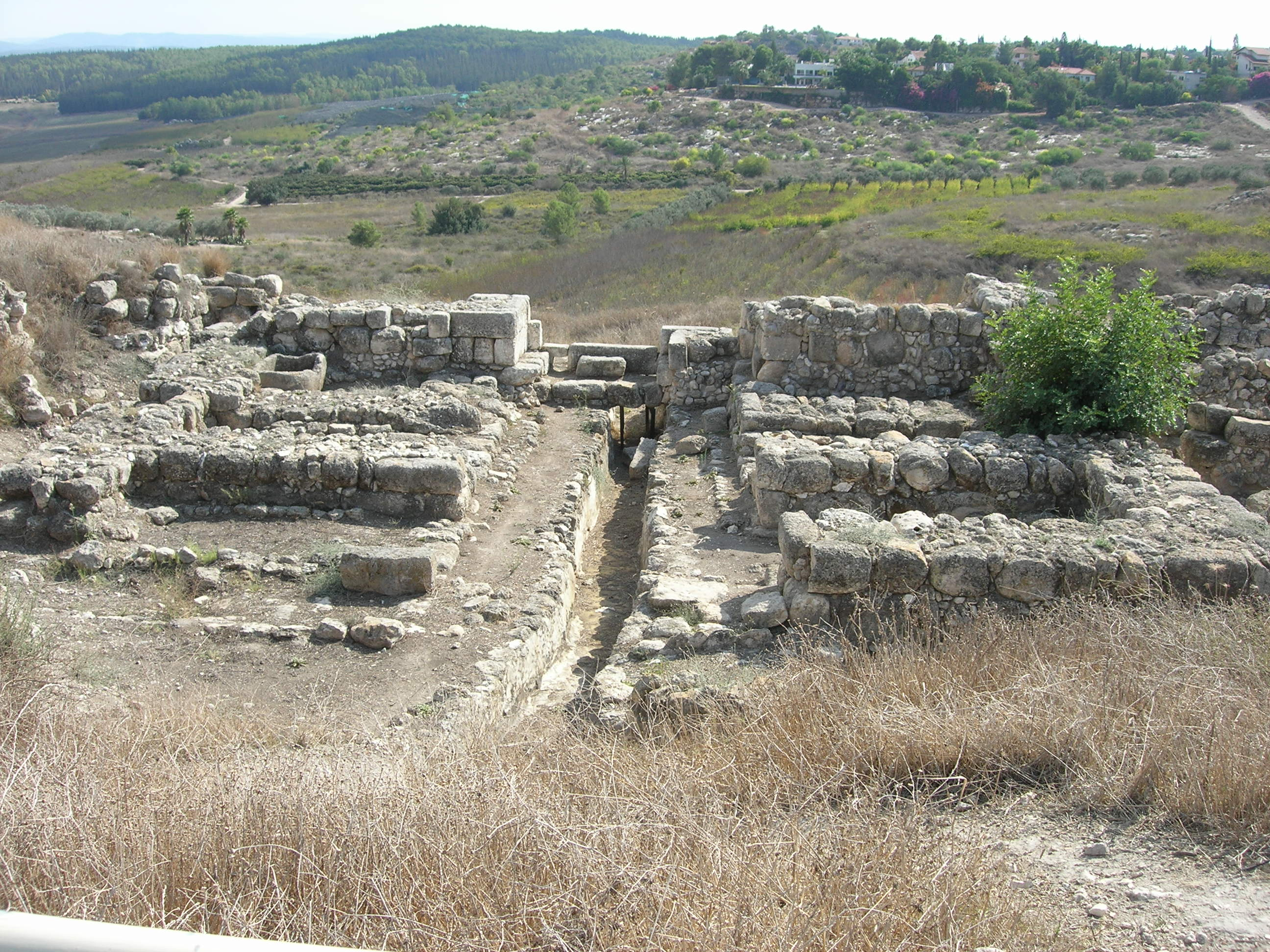 צילום פרטי של שער שלמה בתל גזר, צולם ב-30/10/06.